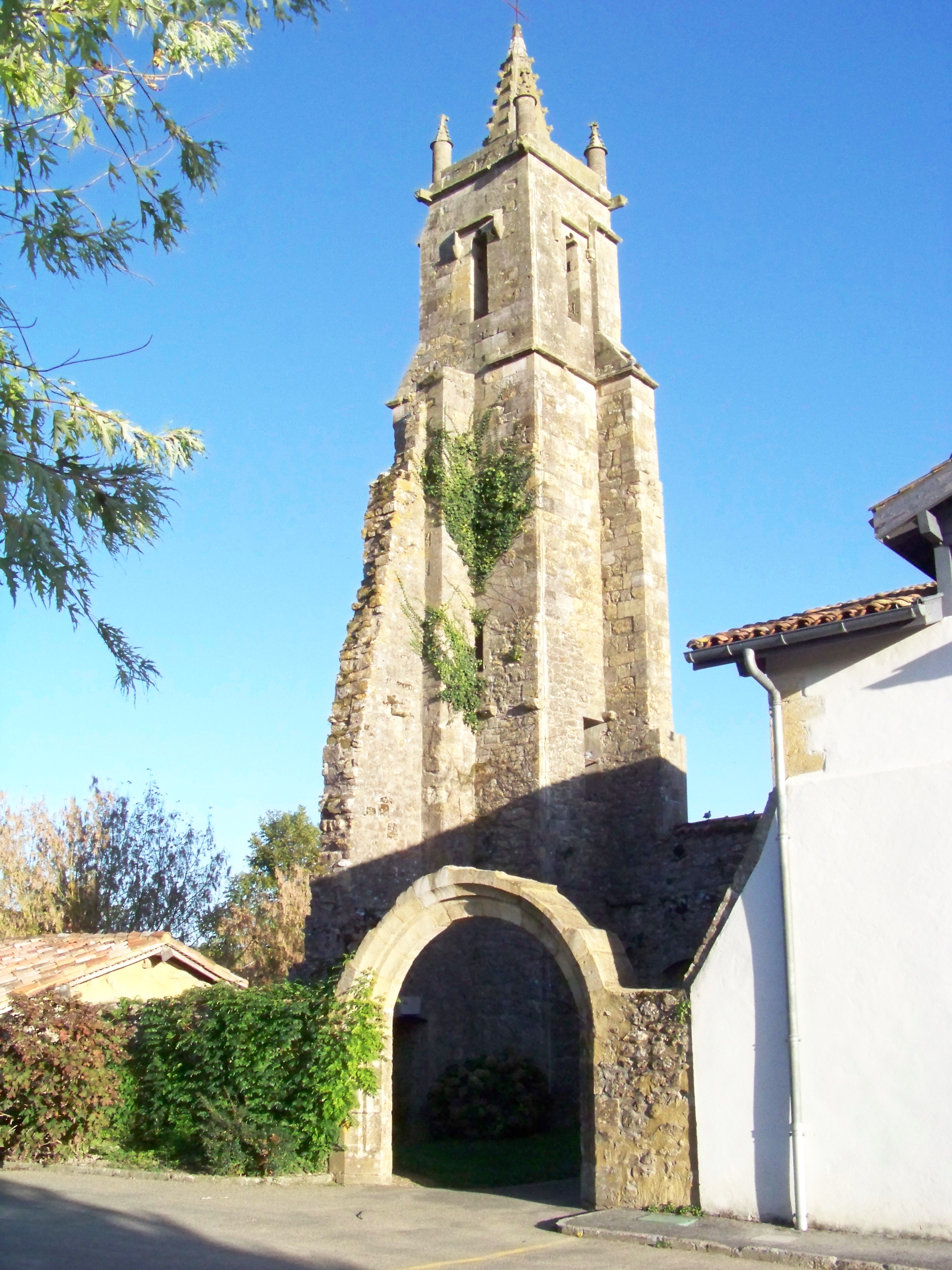 Tour des Augustins, XVe siècle